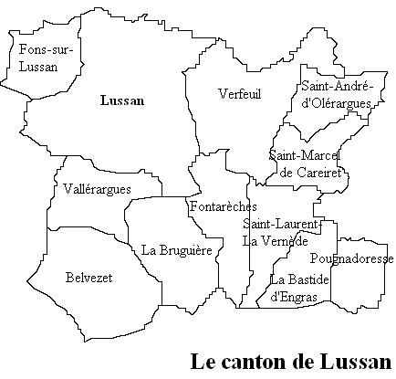 Le canton de Lussan Image personnelle